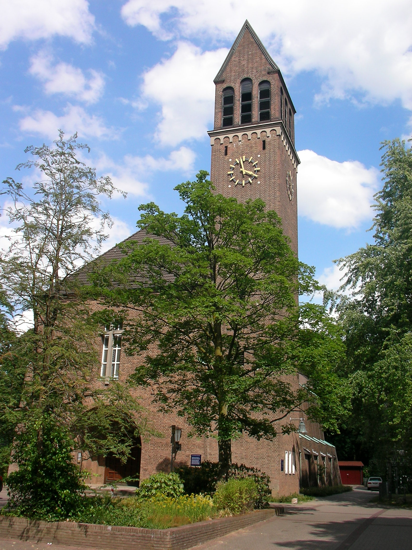 Hamburger Stadtteil Volksdorf; die evangelische Kirche am Rockenhof, auf einem Hügel zwischen U-Bahnhof Volksdorf und dem Hallenbad (Parkbad) errichtet, mit ihrem hohen und weit sichtbaren Turm